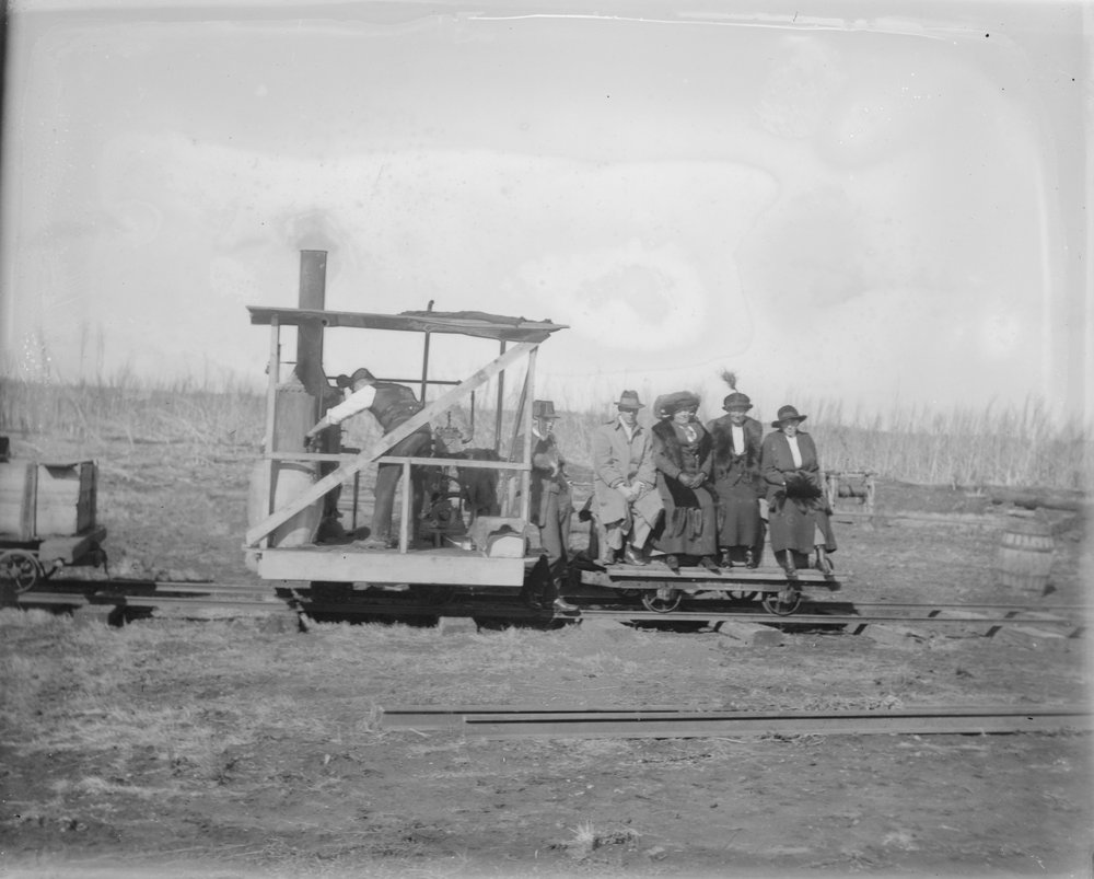 First Class Travel on the Koo Wee Rup Swamp (State Library of Victoria)